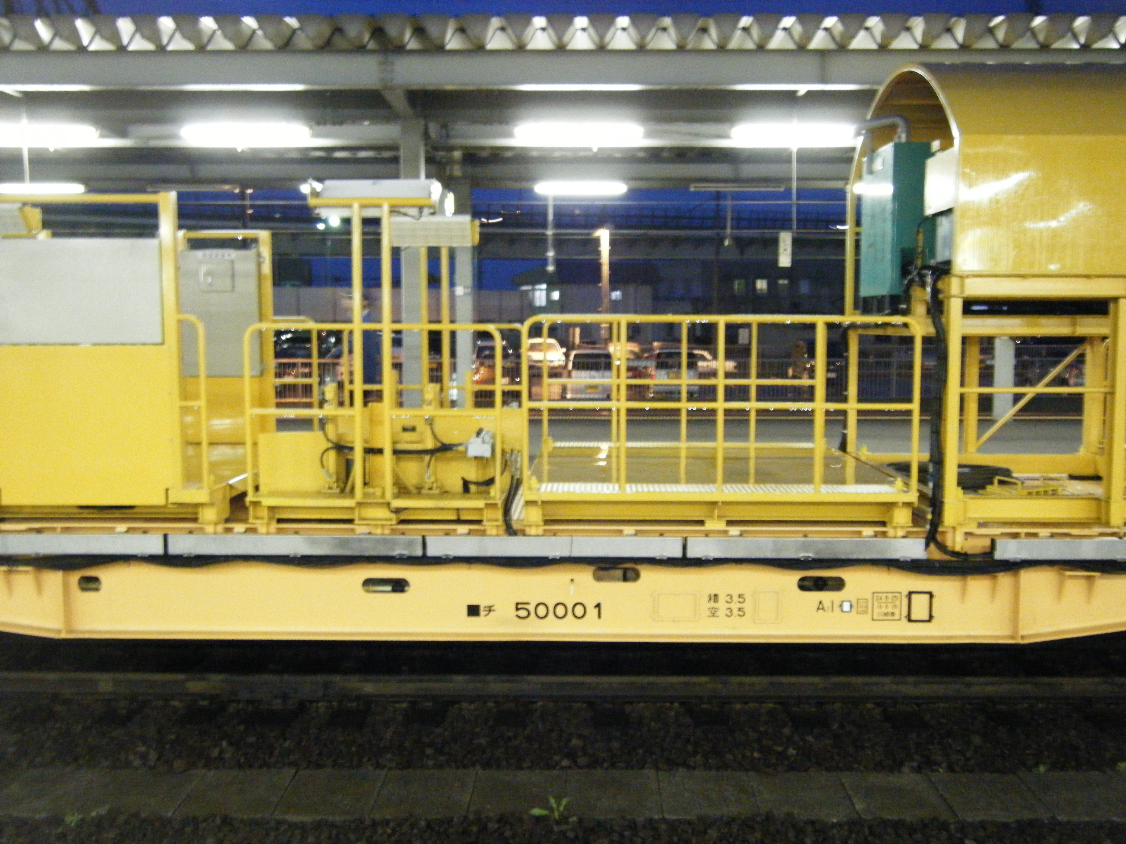 ロングレール輸送車 JR北海道函館本線 函館駅にて